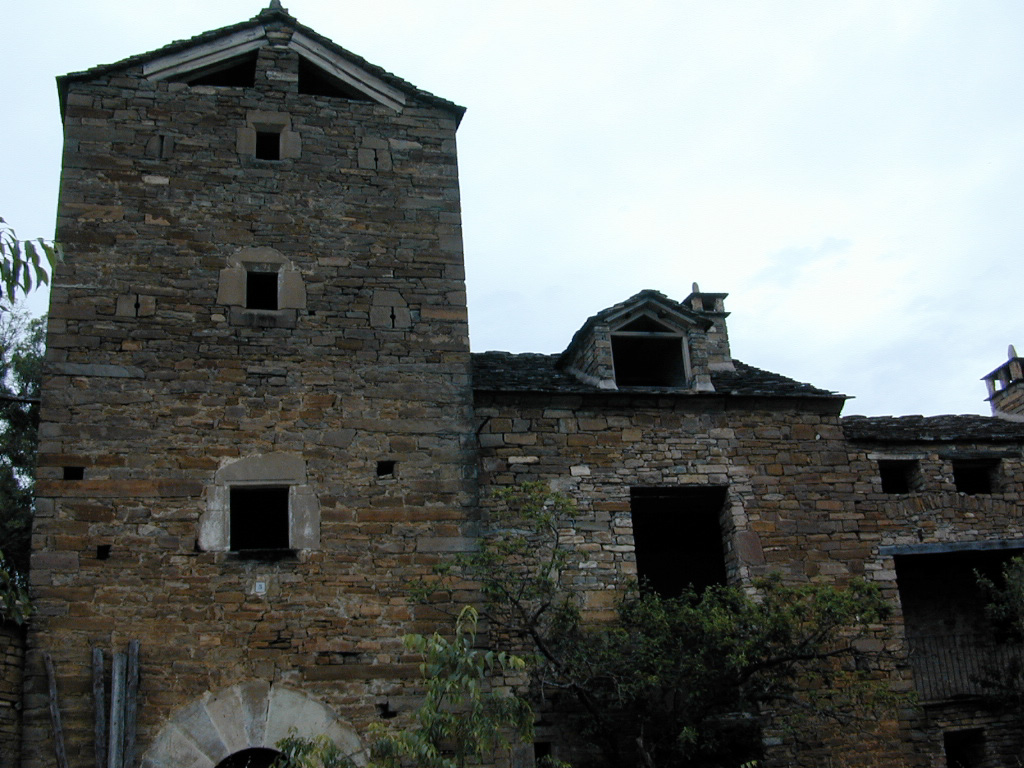 Fachada de casa La Abadía de Gerbe